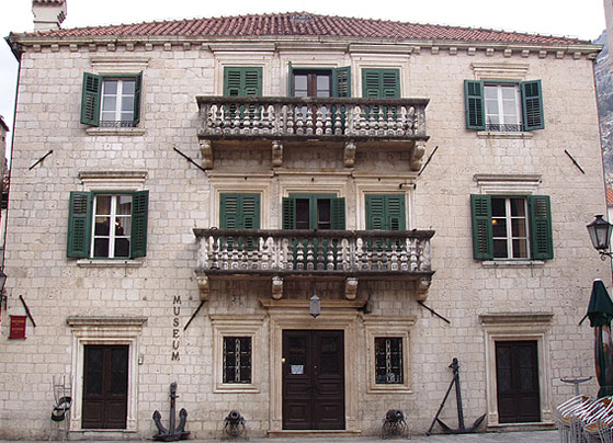 Pomorski muzej Crne Gore